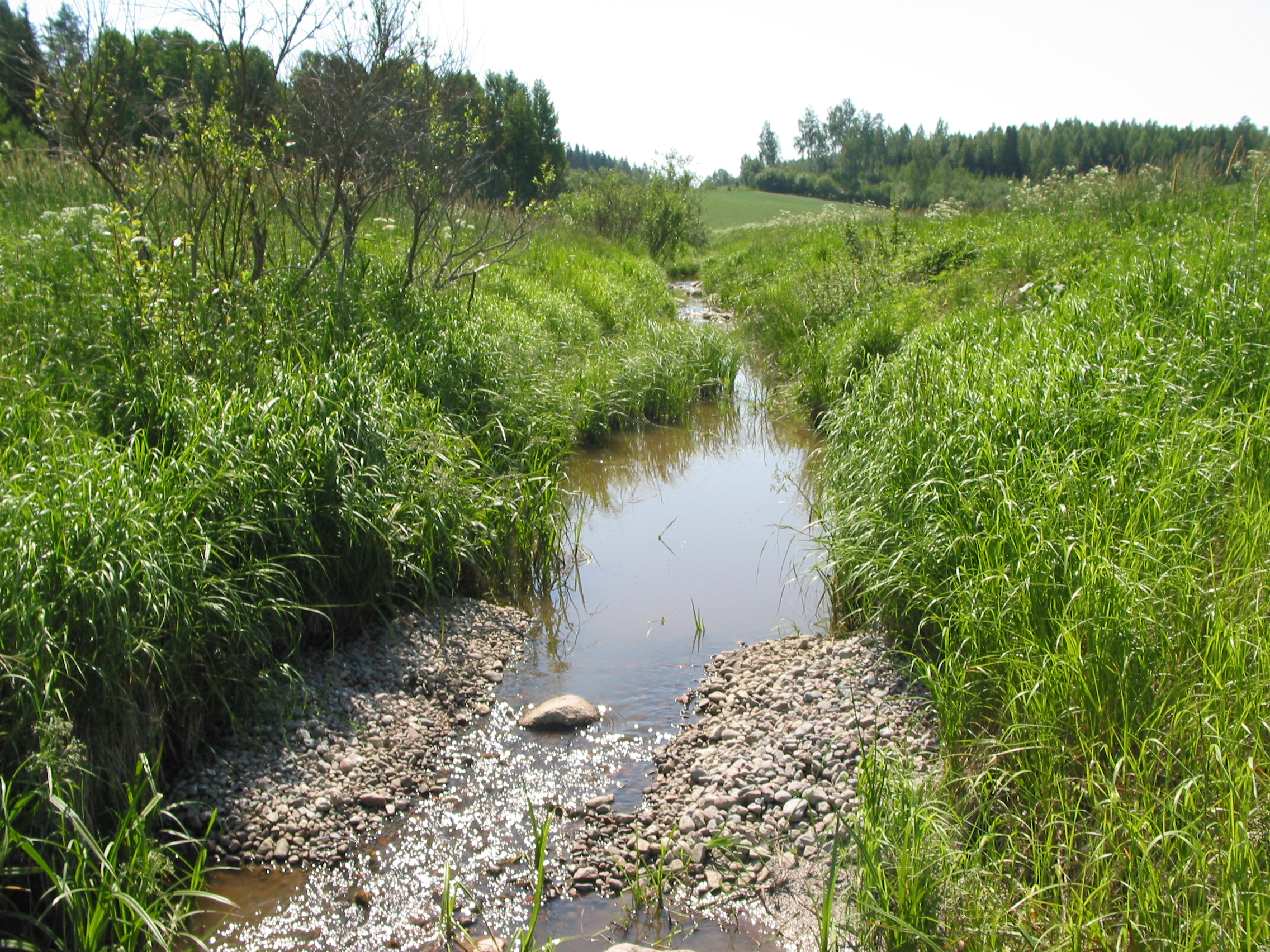 Sorakynnys